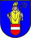 Wappen von Halsenbach